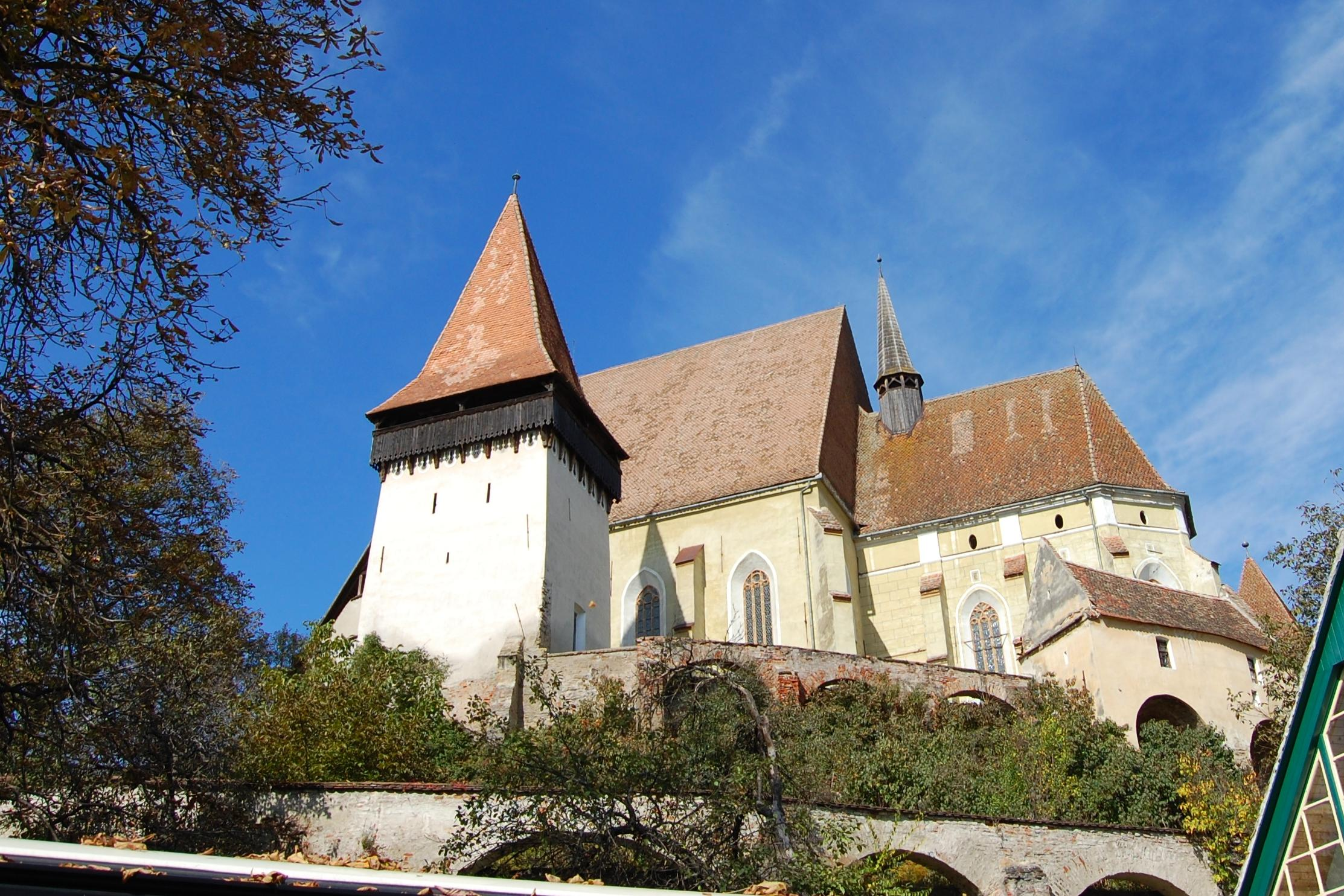 Berethalom - erődtemplom